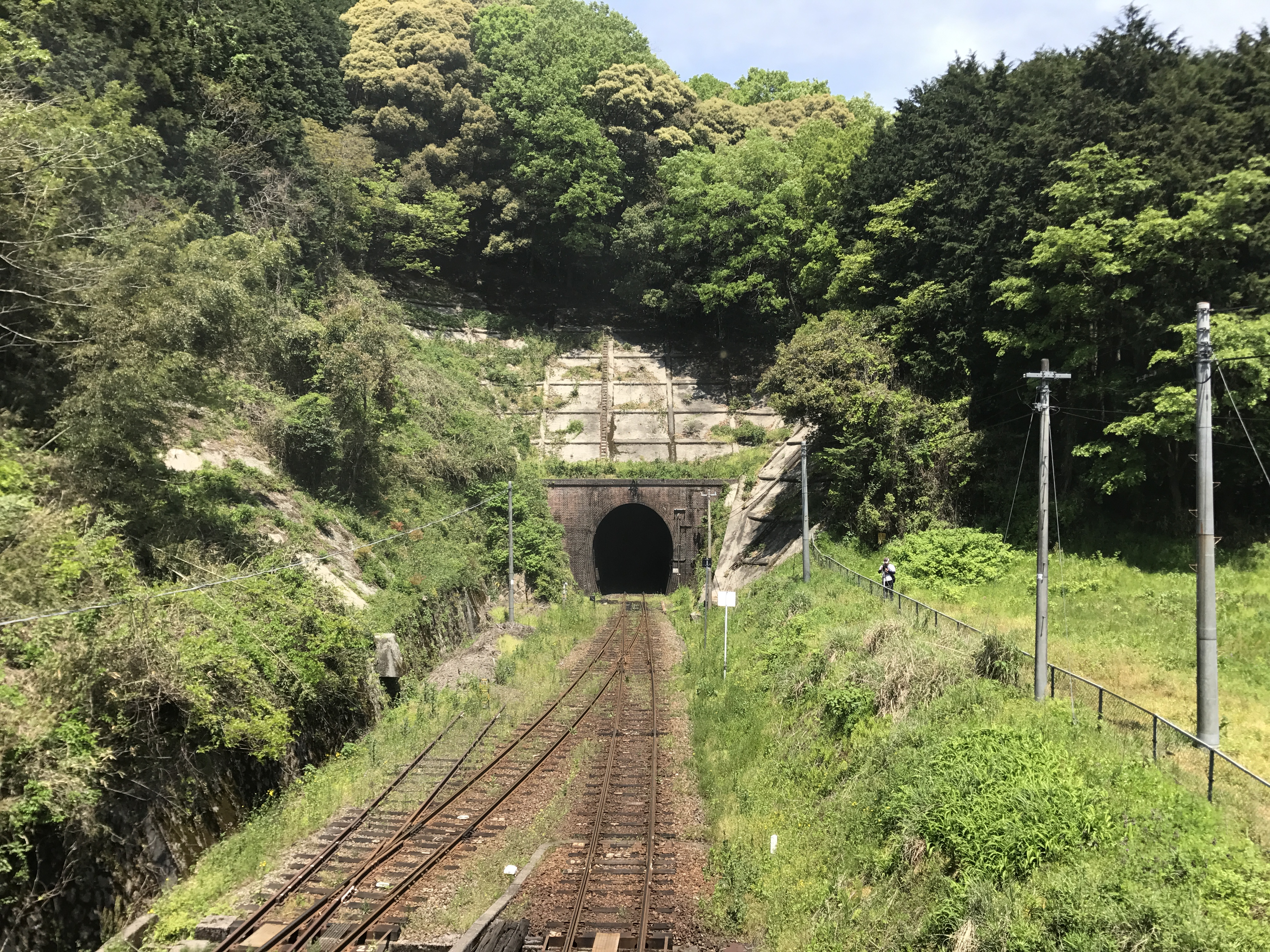 仁保駅の跨線橋より望む篠目方面の木戸山トンネル